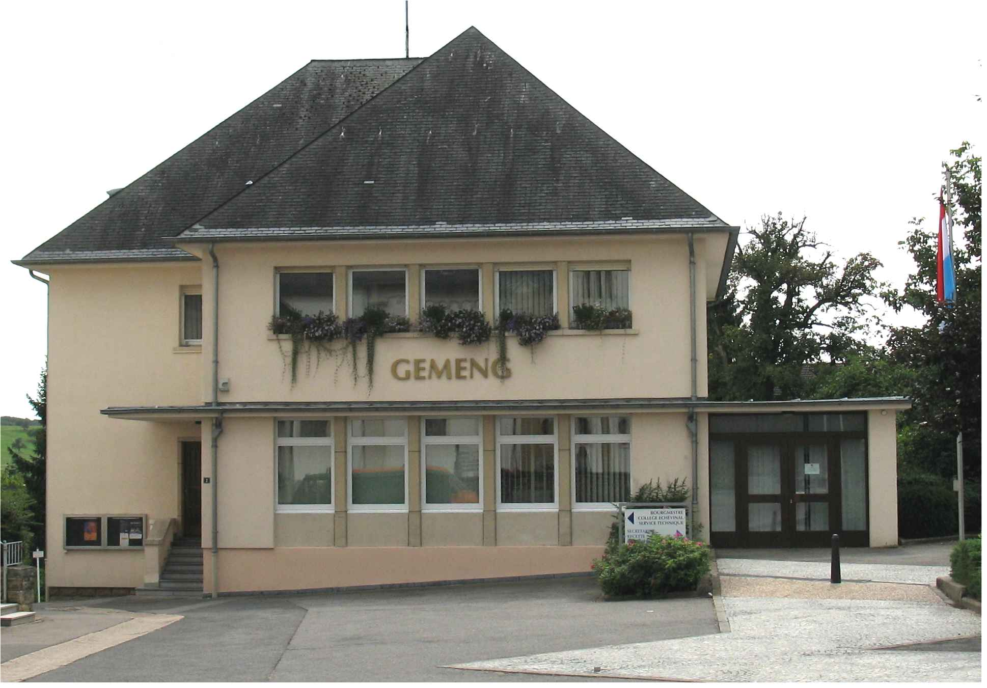 Sujet: D'Gemeng zu Schëtter. Gemengenhaus